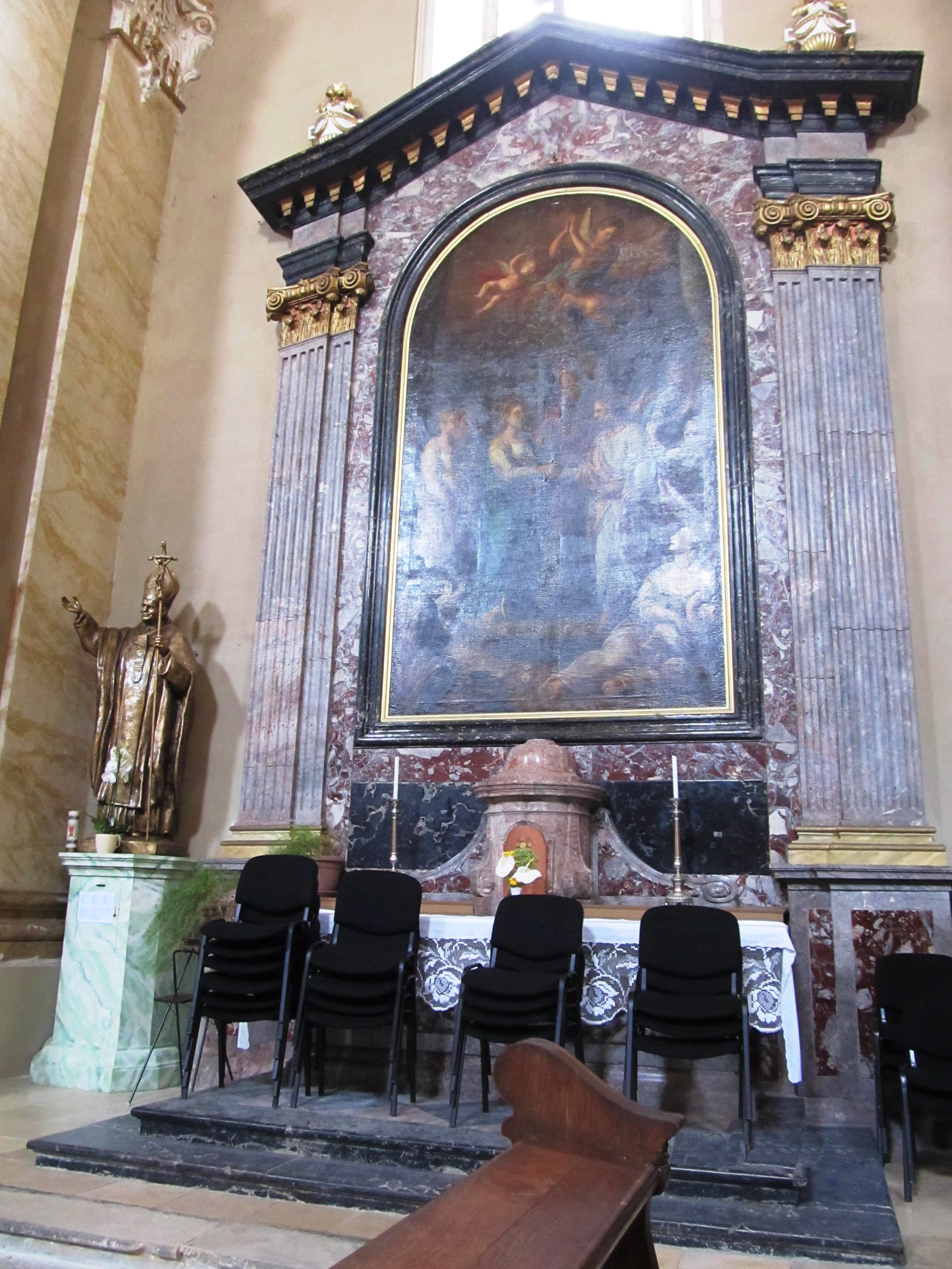 Wallfahrtsbasilika Maria Radna in Lipova, Rumänien.